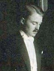 Conde Pedro de Polignac.